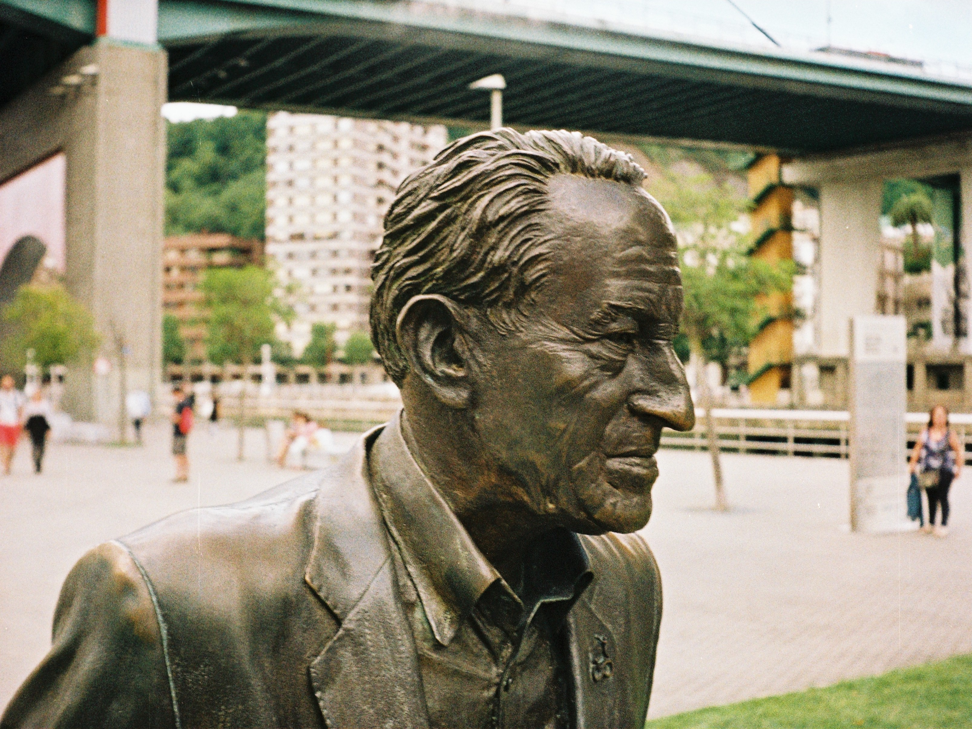 Camera: Chaika II (URSS 1971) Film: Kodak Colorplus 200